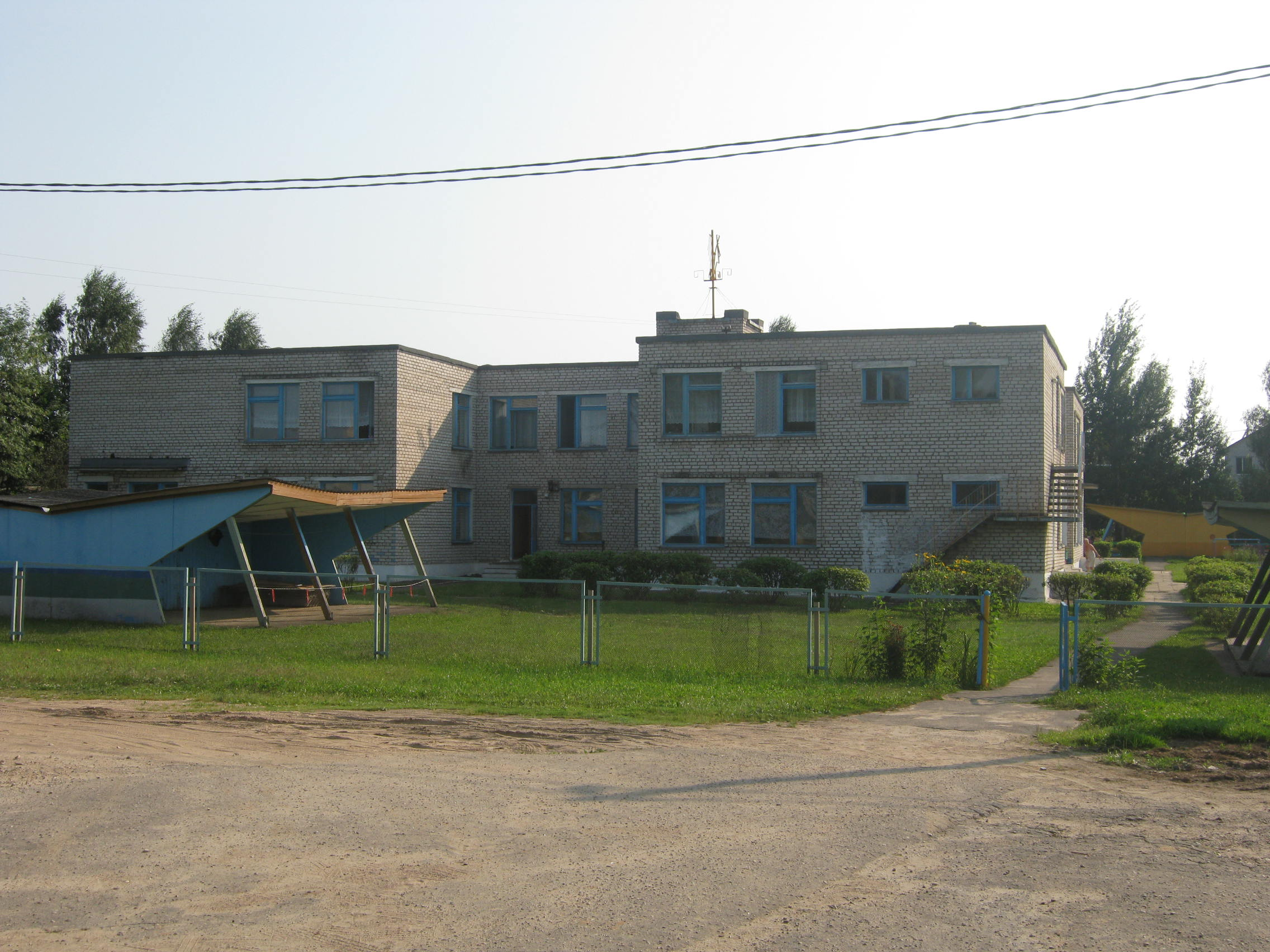 ъэ.юбьти